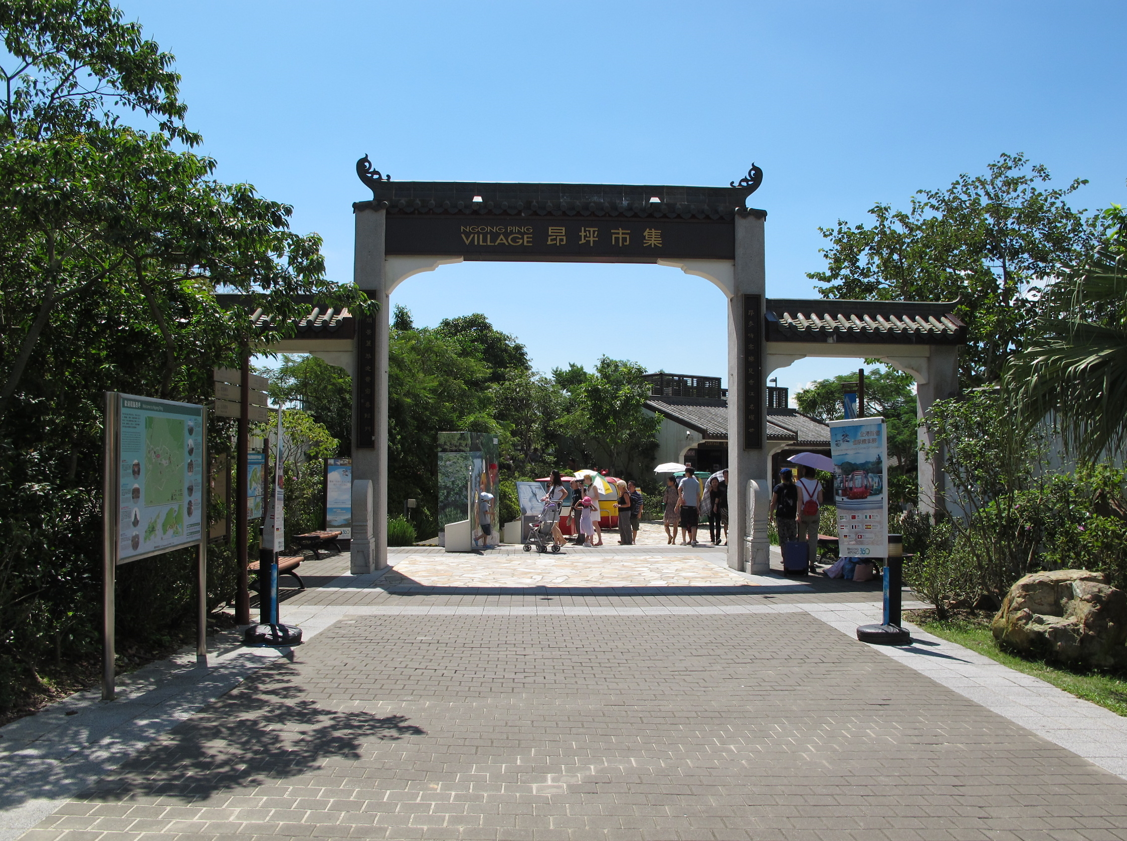 Ngong Ping Village Entrance